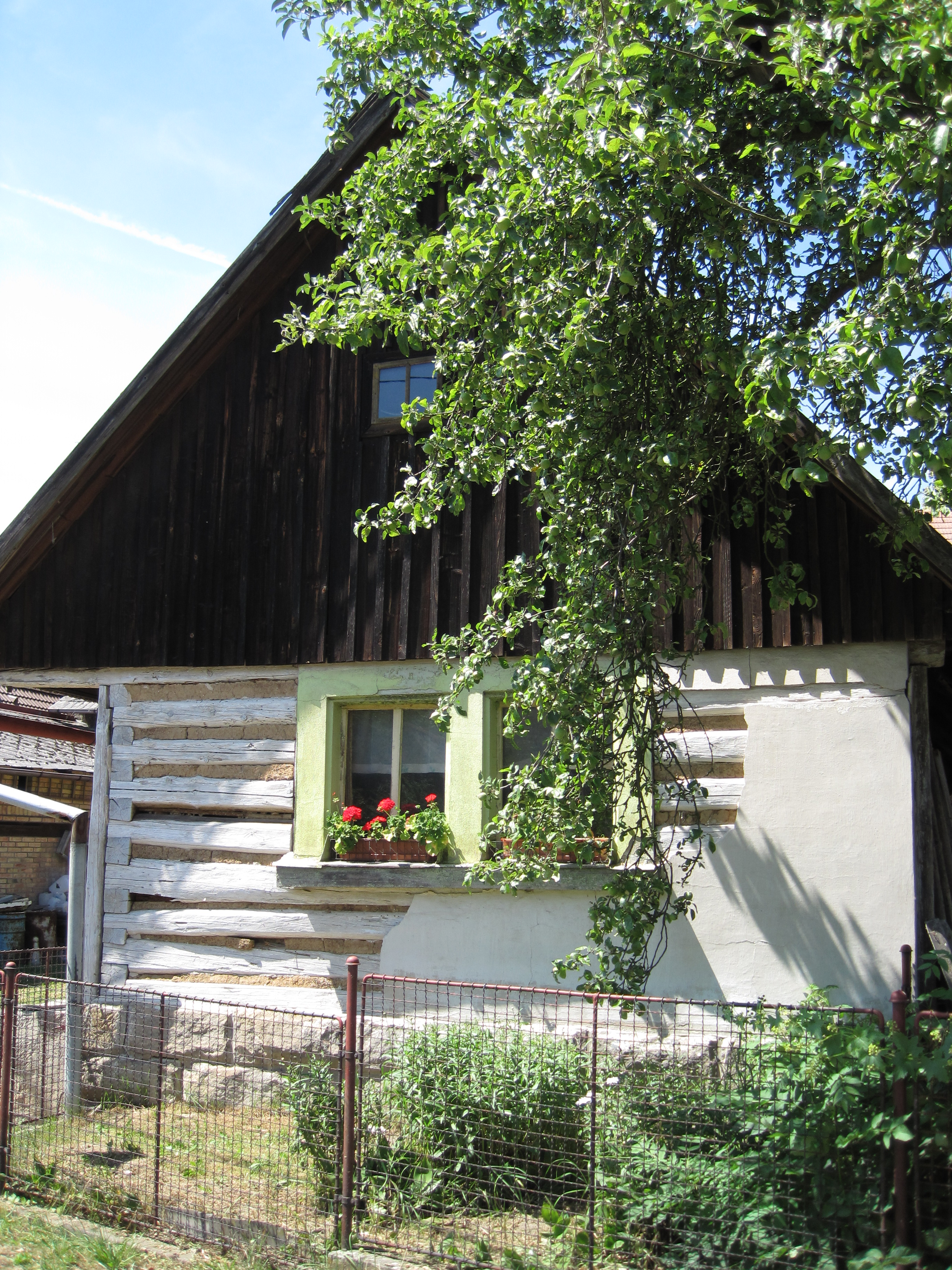 Rytířova Lhota - čp. 31